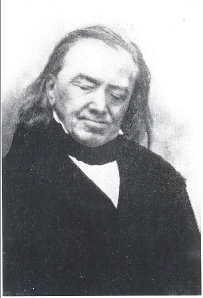 Christoph Bernhard Schlueter